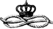 Il "nodo Savoia". * The "Savoy knot".